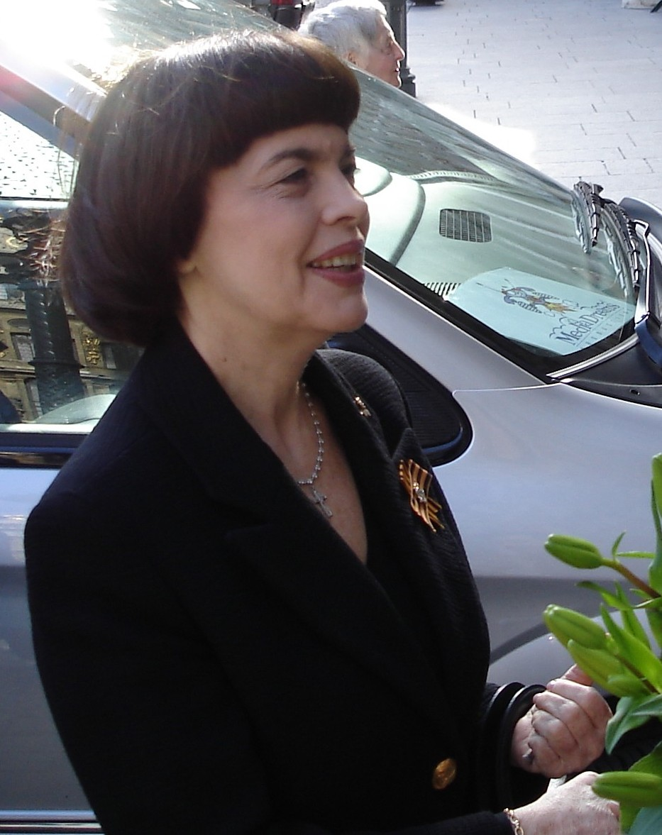 Mireille Mathieu op de Grote Markt in Brussel op 22.03.2006 rond 11 uur 's morgens. Auteur : Ricochet. Fototoestel : Sony 5.1 MPEGMOVIEVXDSC-W5 / Nr. 1553145.